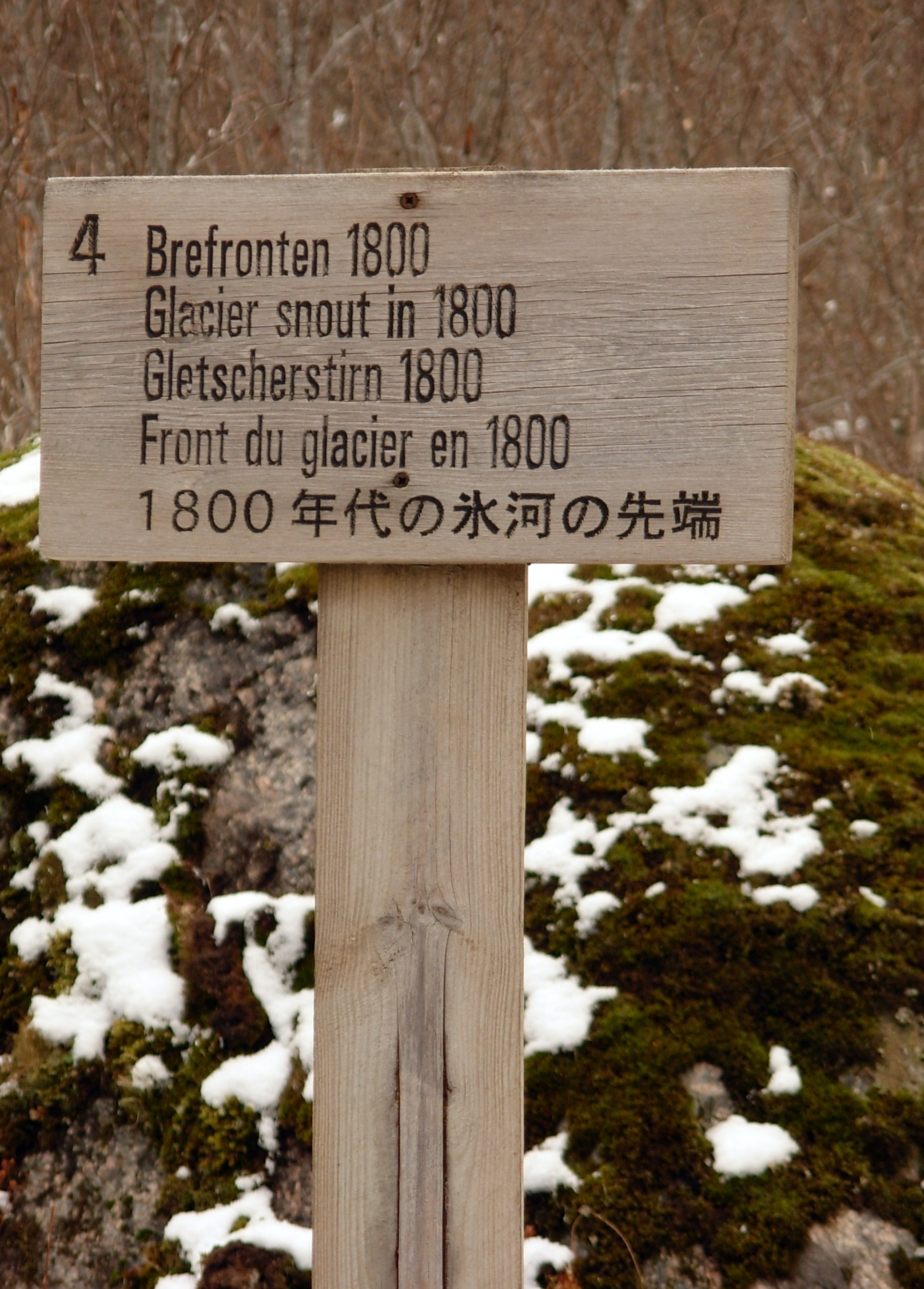 Ledynas 1800 m.